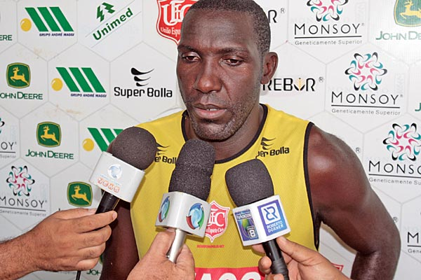 O zagueiro Odvan que atuou no Vasco e Seleção Brasileira.